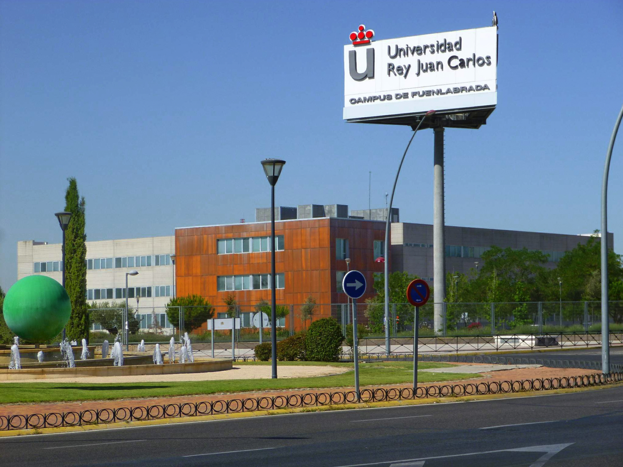 Fuenlabrada - Campus de la Universidad Rey Juan Carlos (URJC) en Fuenlabrada